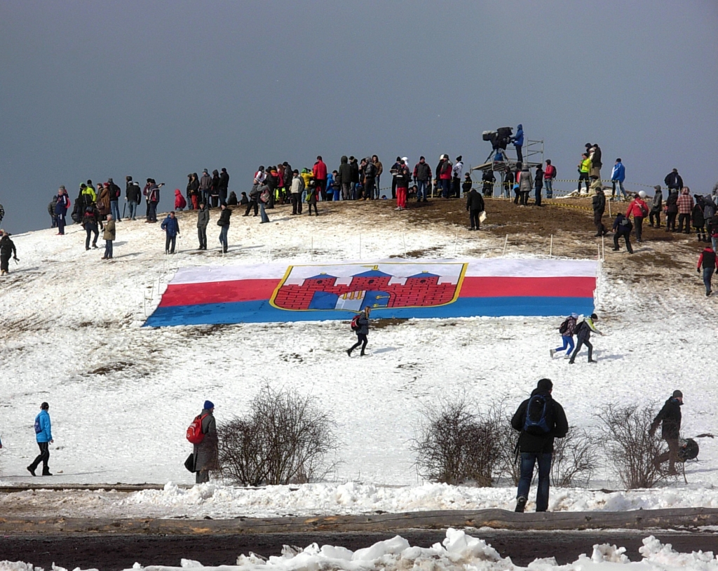 Mistrzostwa Świata w Biegach Przełajowych IAFF 2013 w Leśnym Parku Kultury i Wypoczynku Myślęcinek w Bydgoszczy